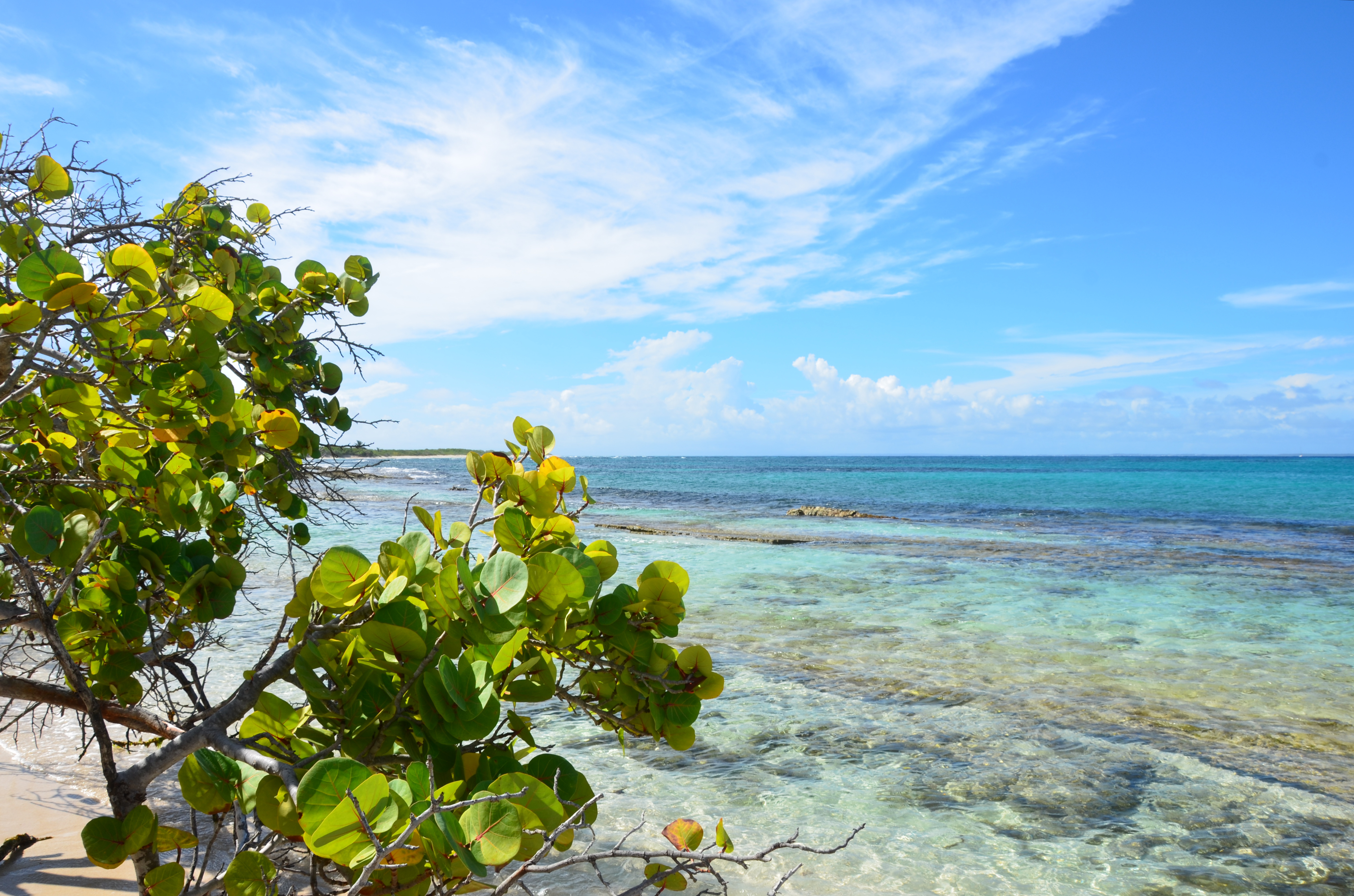 Iles de la Petite-Terre